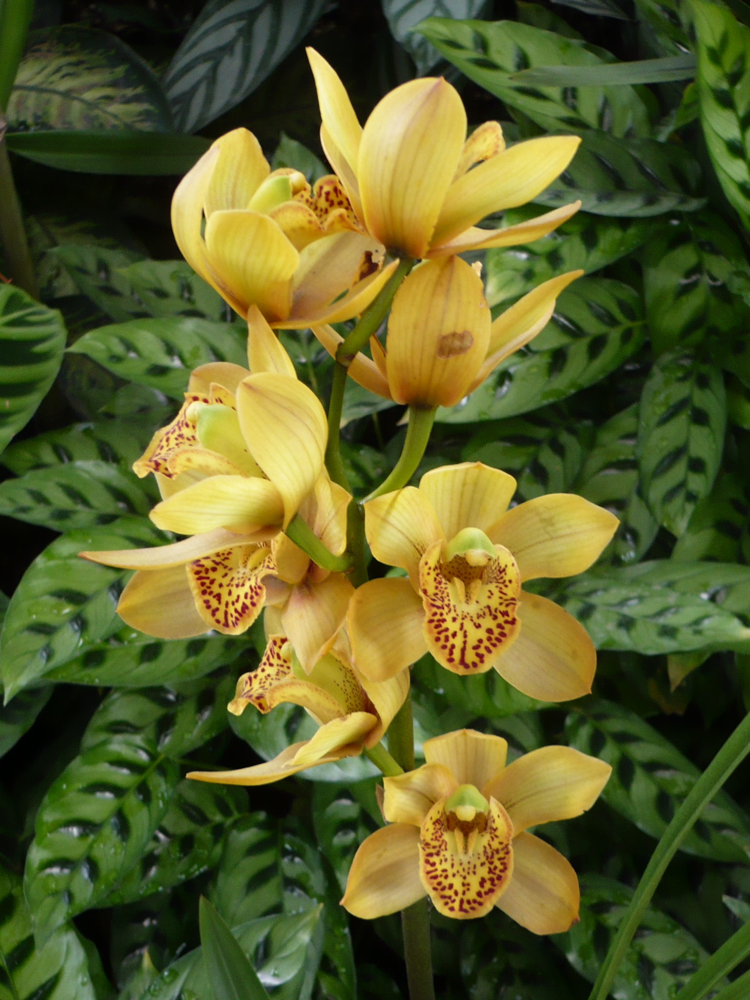 En el orquideario del Jardín Botánico de Medellín. Colombia